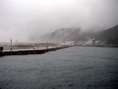 Okata Port, Oshima, Tokyo, Jp